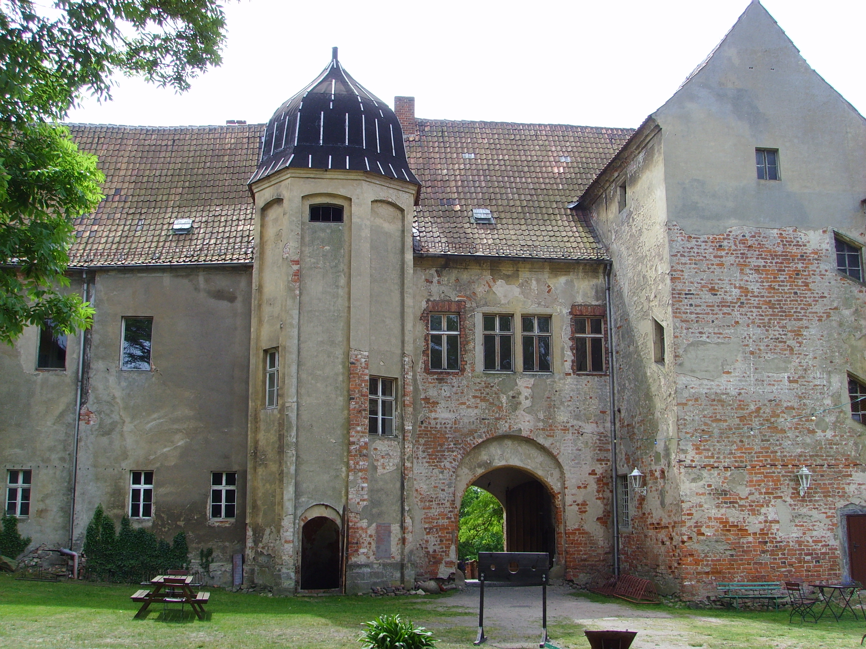 Burg Klöden in Klöden, Ortsteil der Stadt Jessen (Elster); Sicht vom Innenhof